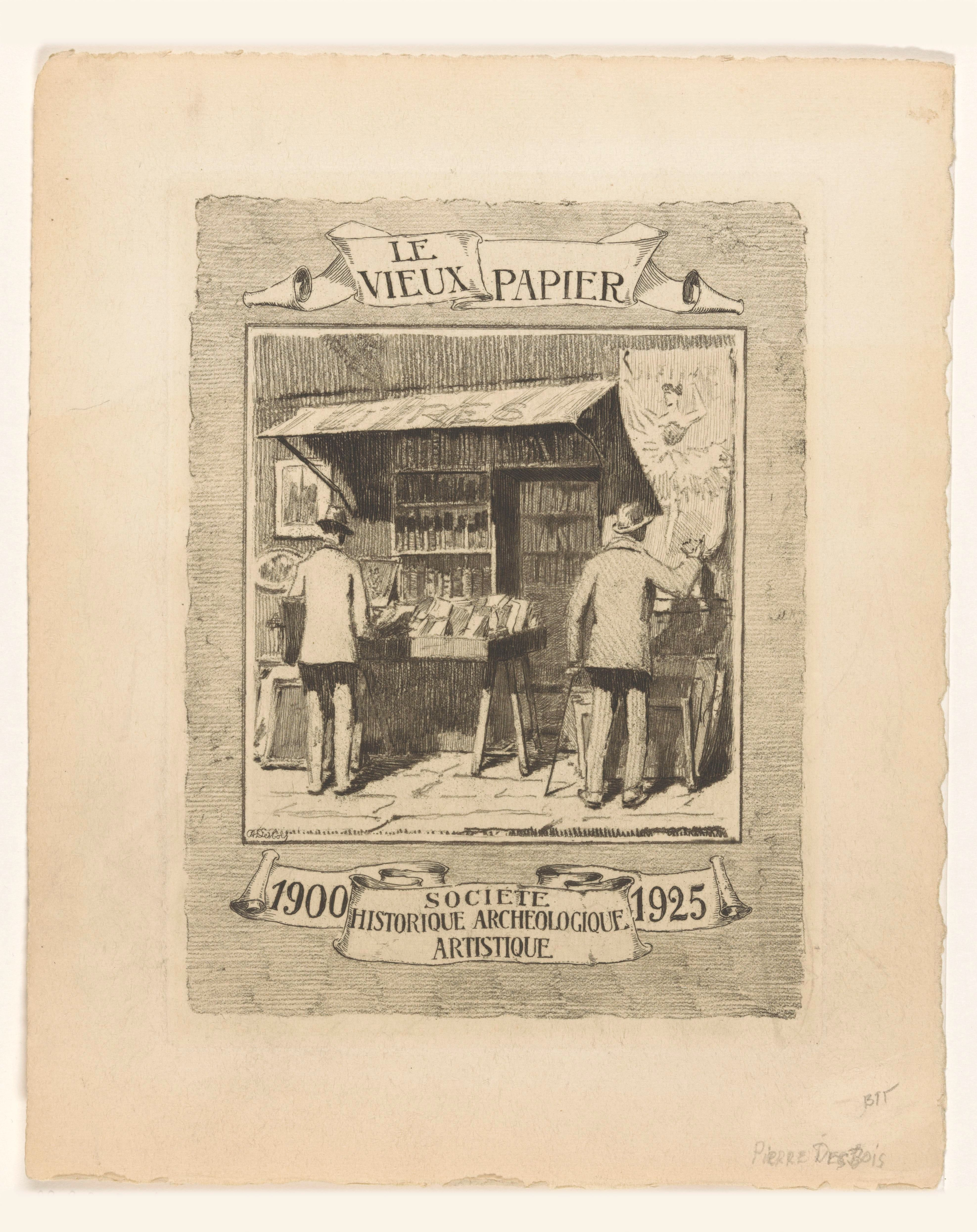 IdentificatieTitel(s): Gedenkprent ter ere van het 25-jarig bestaan van Le Vieux PapierObjecttype: prent Objectnummer: RP-P-2015-26-230Opschriften / Merken: verzamelaarsmerk, verso, gestempeld: Lugt 2228verzamelaarsmerk, verso, gestempeld: Lugt 4779Omschrijving: Twee mannen voor een boekenkraam onder een overkapping, een van hen inspecteert een poster met een danseres. Op de achterzijde van de prent is een brief bevestigd, gedateerd 25 februari 1926. Hieruit blijkt dat alle leden van Le Vieux Papier een afdruk hebben ontvangen en dat de Oplage: is bekostigd door Paul Radius te Parijs.VervaardigingVervaardiger: prentmaker: Pierre Desbois (vermeld op object)Plaats vervaardiging: ParijsDatering: 1925Fysieke kenmerken: ets, droge naald en vernis mouMateriaal: papier Techniek: etsen / droge naald / vernis mouAfmetingen: plaatrand: h 198 mm × b 148 mmOnderwerpWat: book-stall, kioskfemale dancerposterVerwerving en rechtenCredit line: Legaat van de heer S. Emmering, AmsterdamVerwerving: legaat 2000Copyright: Publiek domein